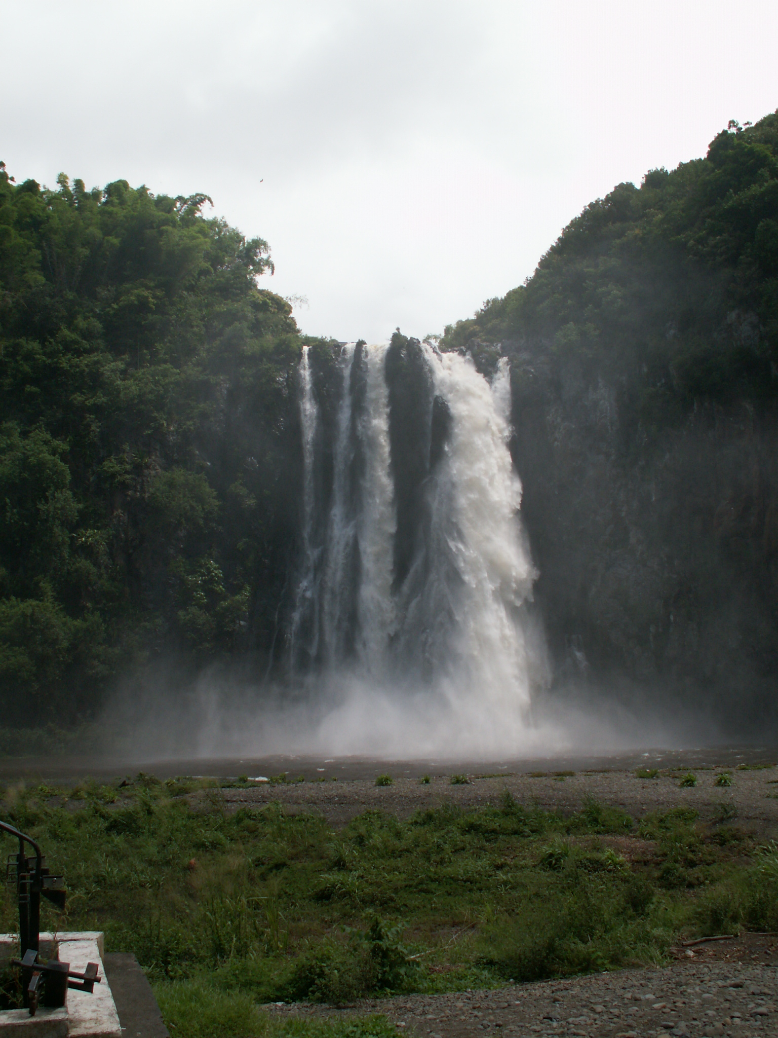 La cascade Niagara, à Sainte-Suzanne, sur l'île de La Réunion. Oeuvre personnelle 12/02/2007 Jean-Michel Robineau